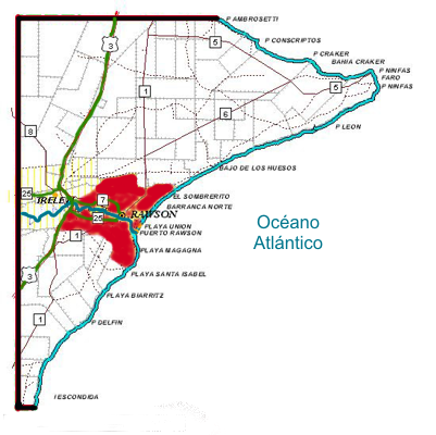 Departamento Rawson y ejido urbano de Rawson-Chubut-Argentina